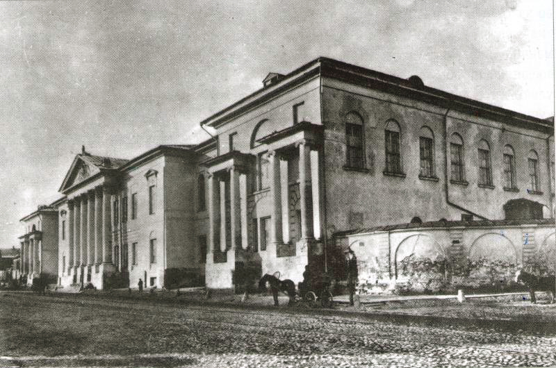 Константиновский межевой институт (бывшая усадьба Куракиных)